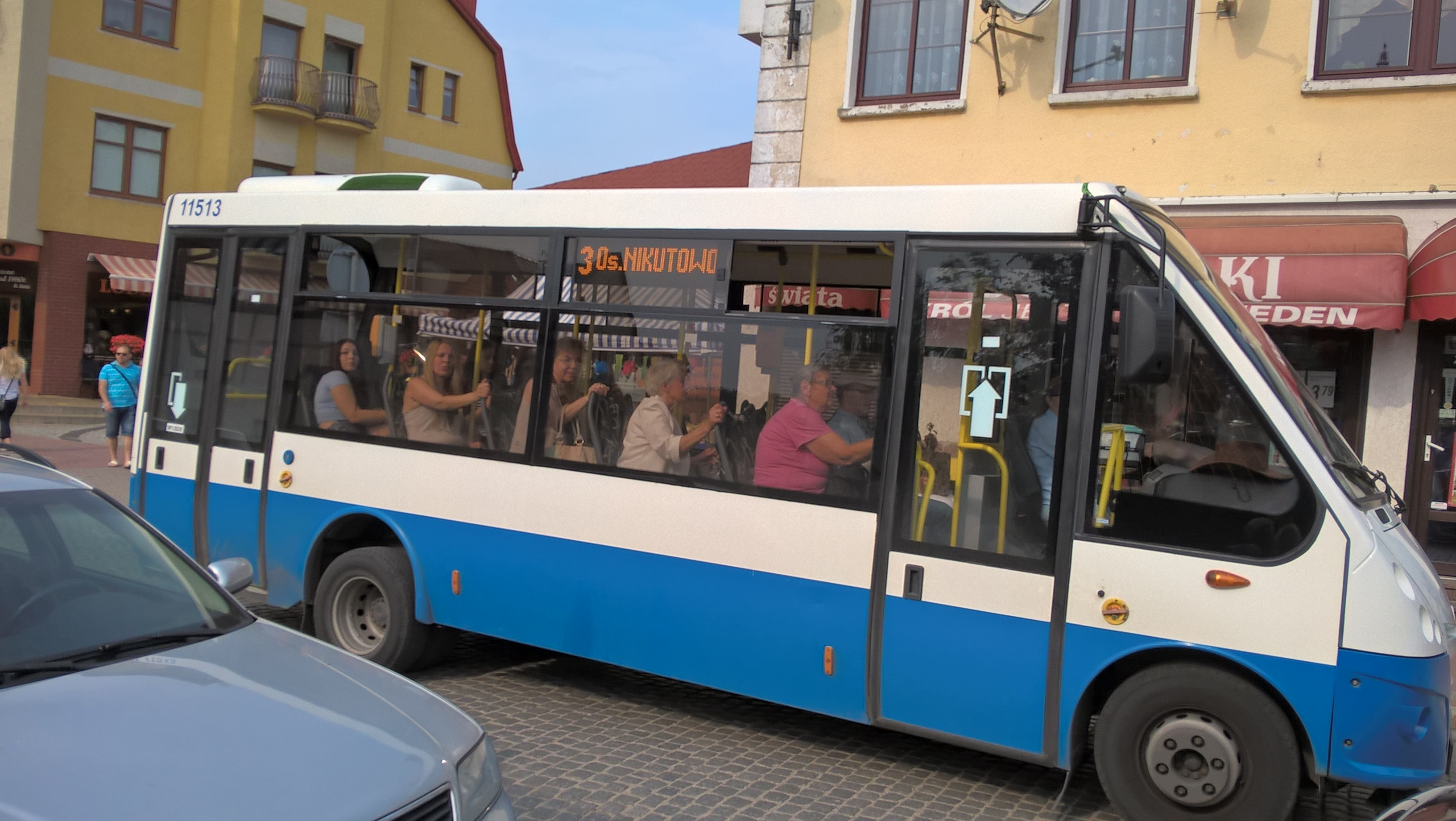 Autobus komunikacji miejskiej w Mrągowie